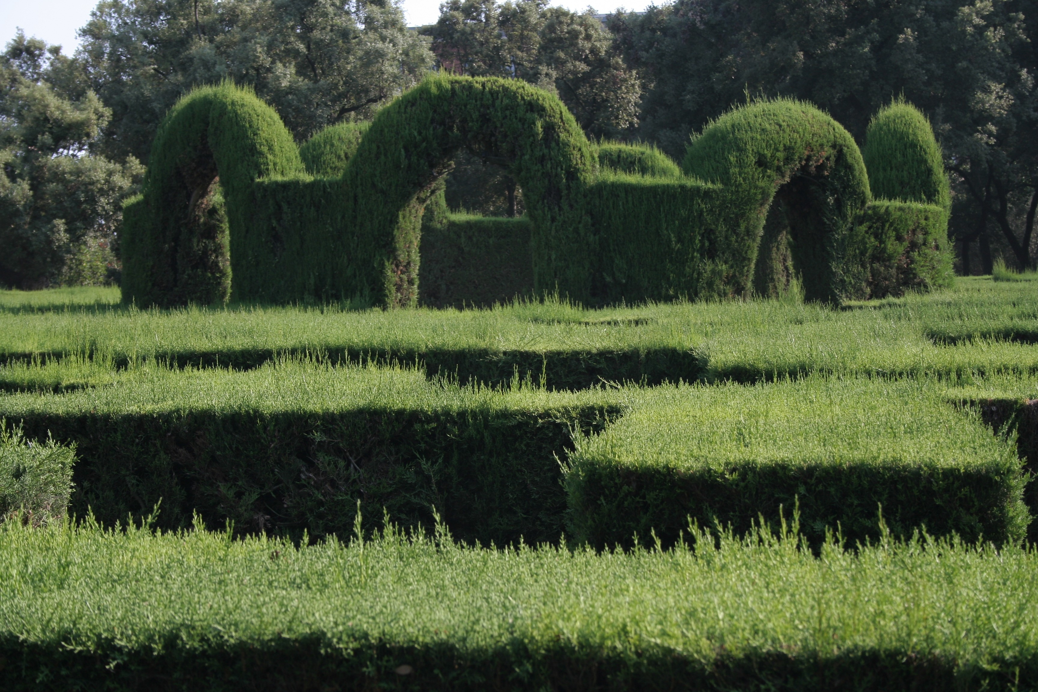 Hedge maze, Jardines del siglo XVIII, Barcelona.